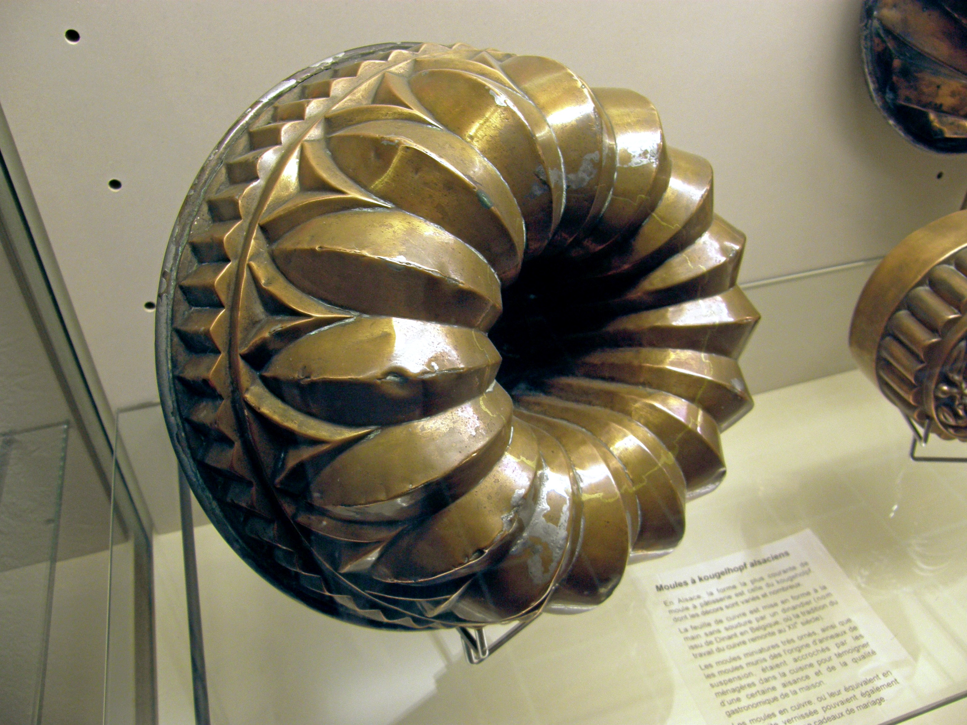 Photo d'un moule à kouglof alsacien. Musée d'unterlinden.